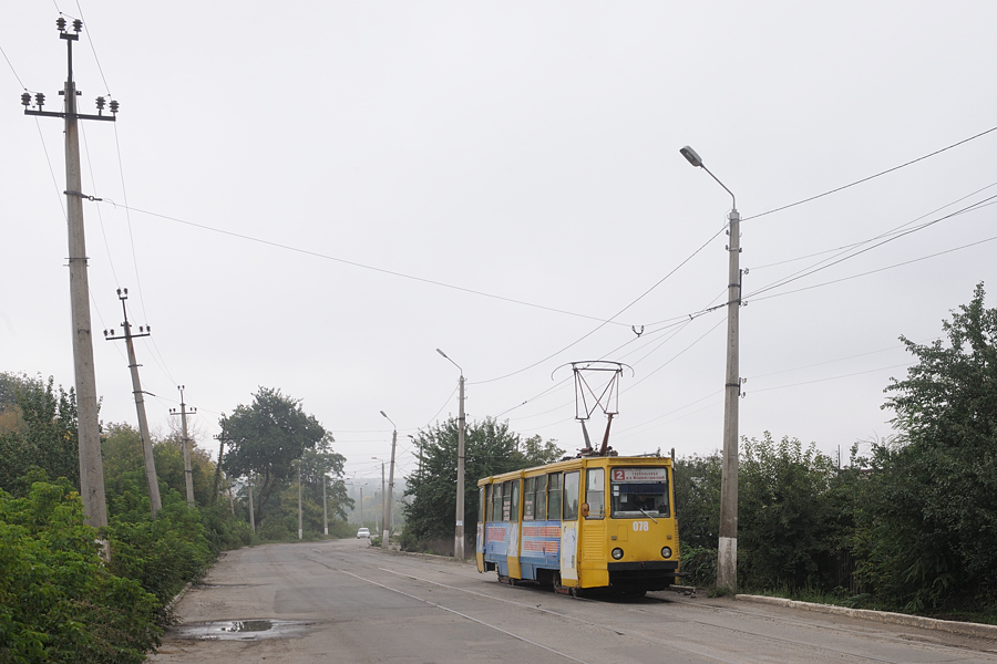 KTM-5 in Druschkiwka